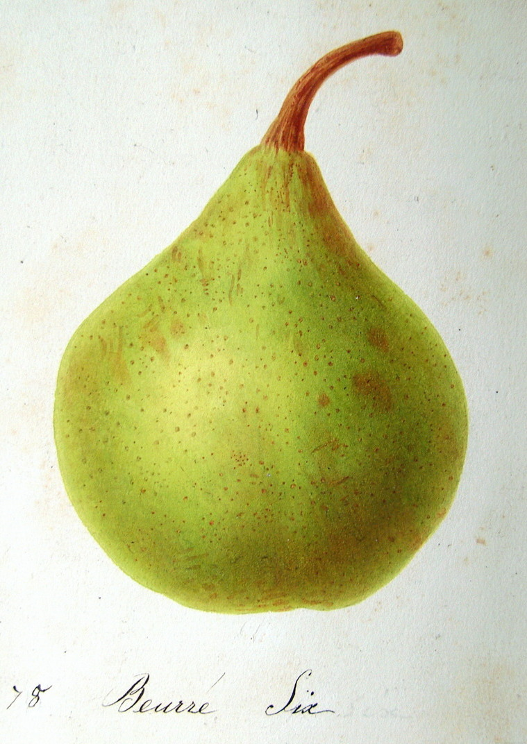 Beurré Six, Alphonse Mas, Le Verger français.